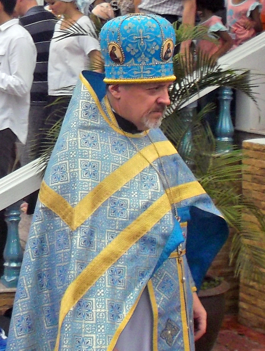 Архимандрит Олег (Черепанин) в Успенском монастыре